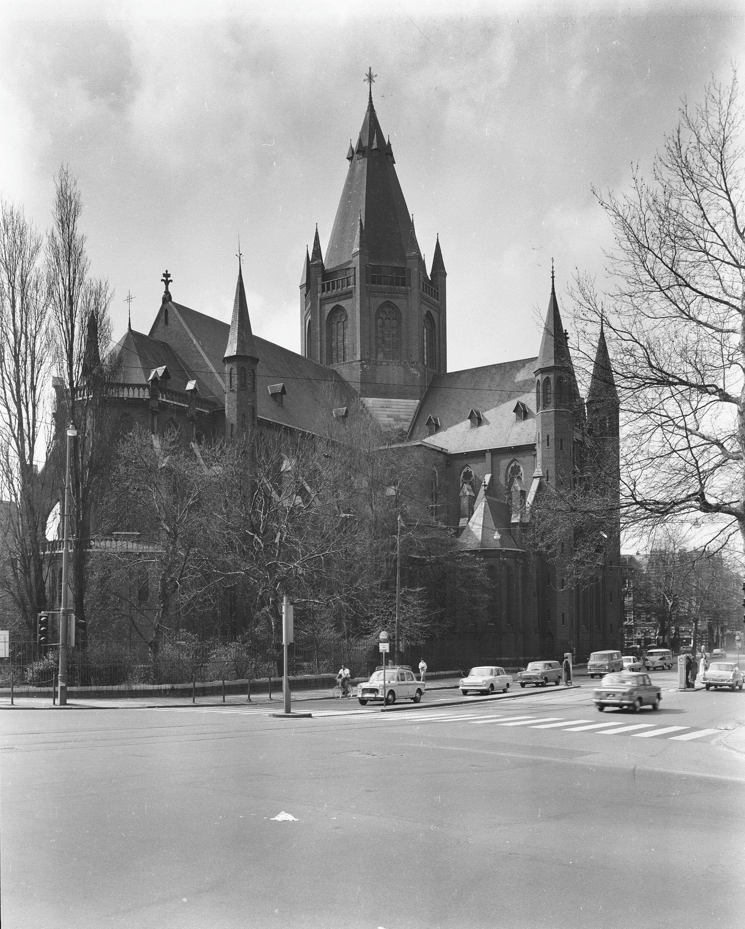 St.Willibrorduskerk: buiten de Veste, exterieur overzicht